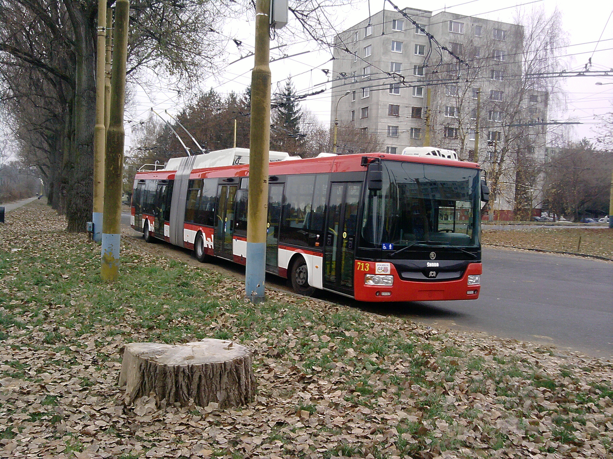 Trolejbus Škoda 31 Tr v obratisku Sídlisko III, Prešov